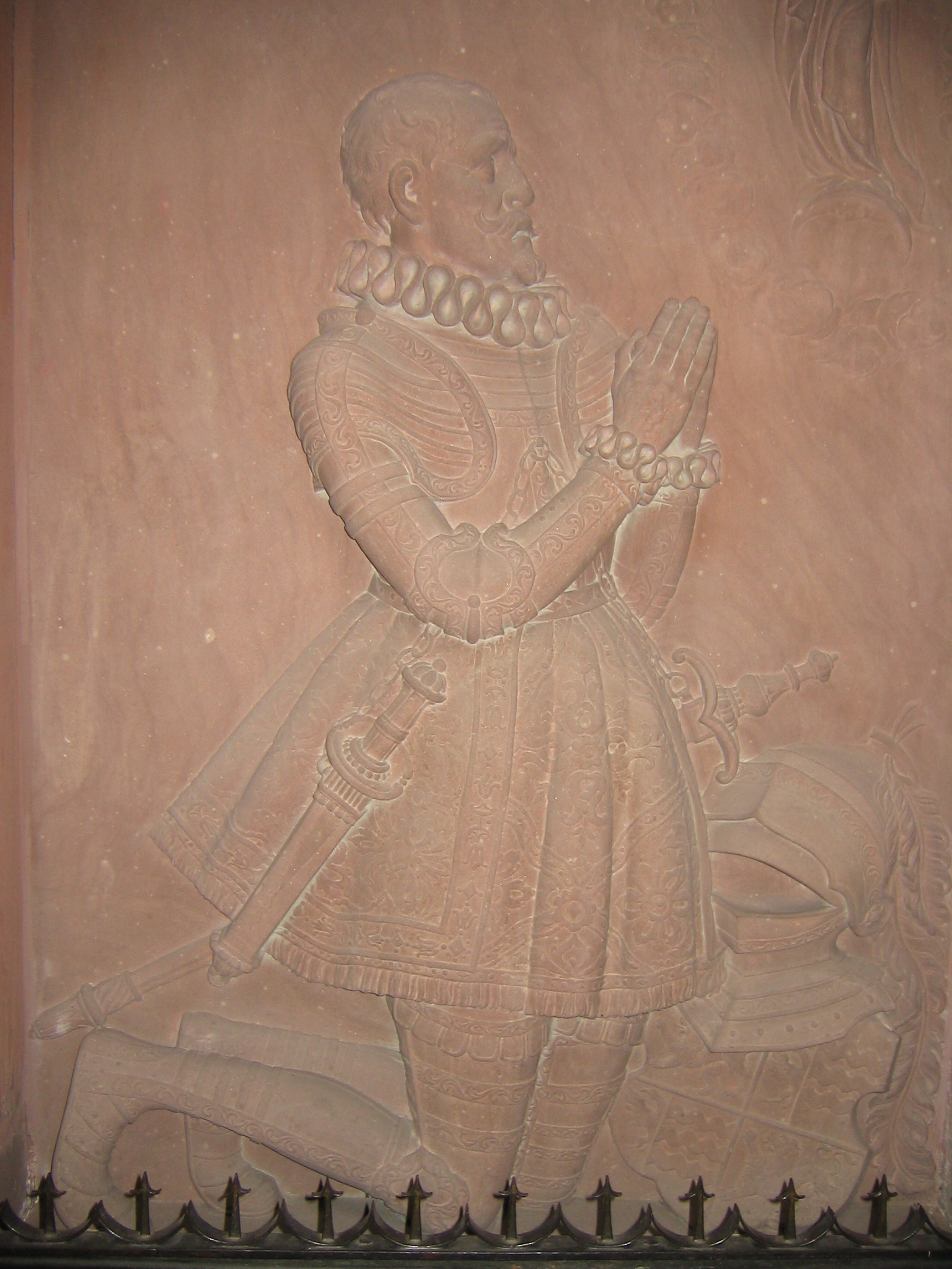 Von Franz Xaver Hauser geschaffene Bildplatte von Konrad I. von Zähringen im Freiburg Münster